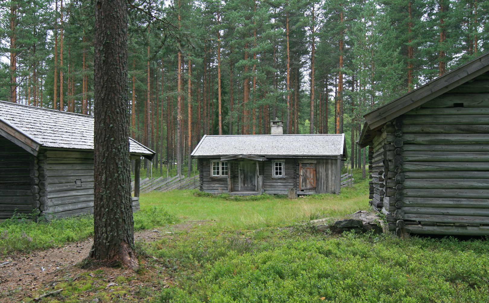 Husmannsplassen på Glomdalsmuseet, Elverum. Stua er fra Hof i Åsnes; bygd omkring 1850.